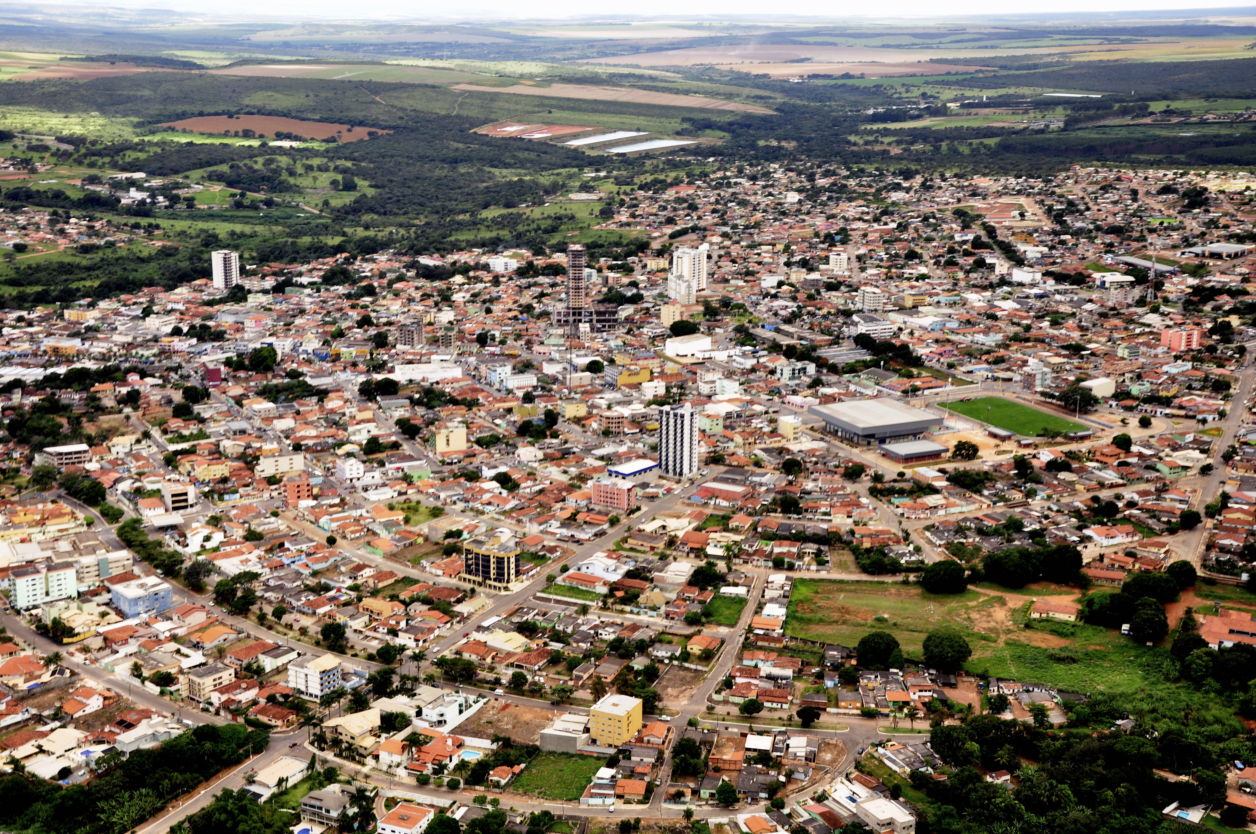 Foto aérea de Luziânia